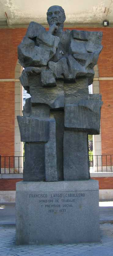 Monumento a Francisco Largo Caballero en los Nuevos Ministerios de Madrid (España). Realizado por José Noja (n. 1938) en 1985.